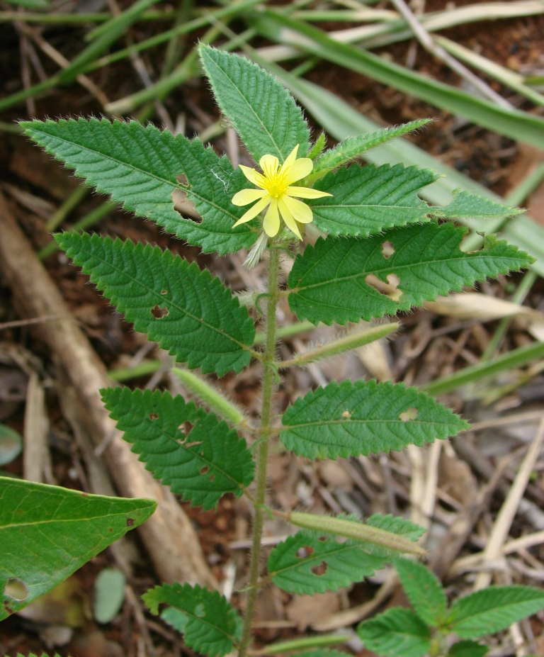 Corchorus hirtus - MALVACEAE Parque Olhos D'Água - Brasília - DF - Brasil.